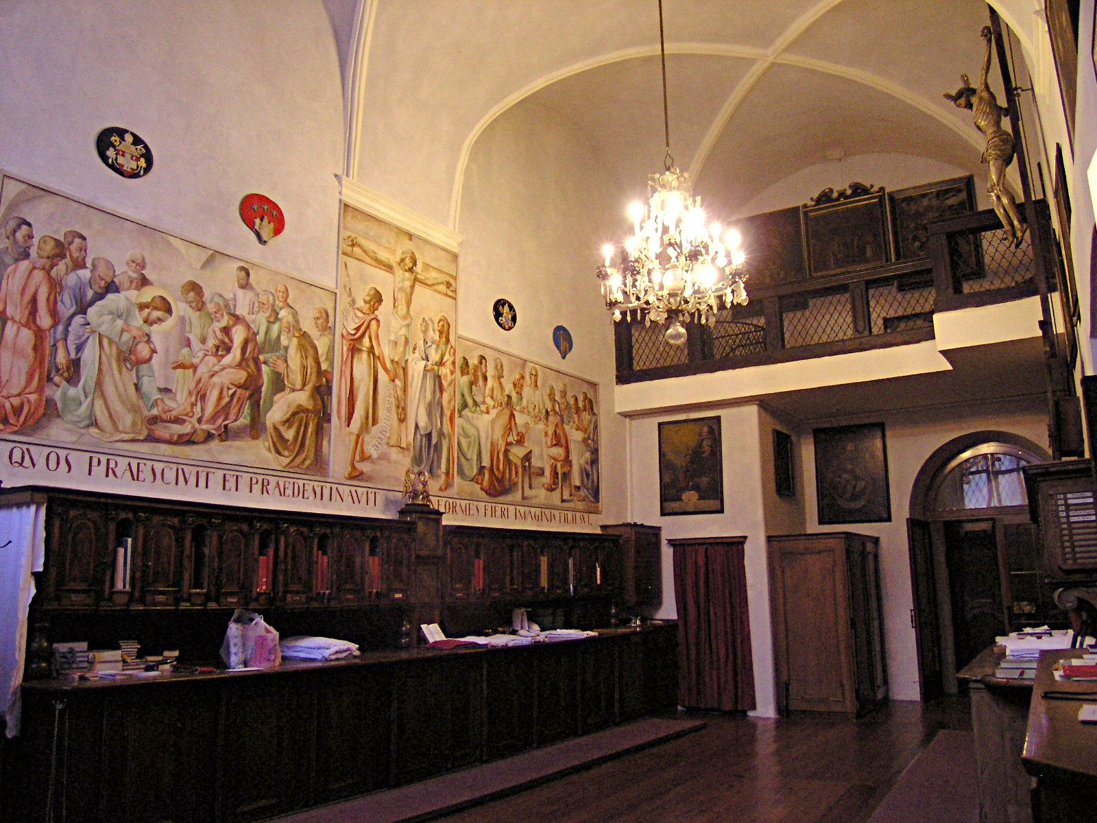 Sakristei des Domes zu Brixen, einer Römisch-Katholischen Basilika, ehemaliger Bischofssitz des Bischofs von Brixen, heute der Diözese Bozen-Brixen zugehörig. Im Bild ist nur der Hauptraum sichtbar; hier halten sich die Priester auf. Für die Ministranten ist ein Raum nebenan vorgesehen.